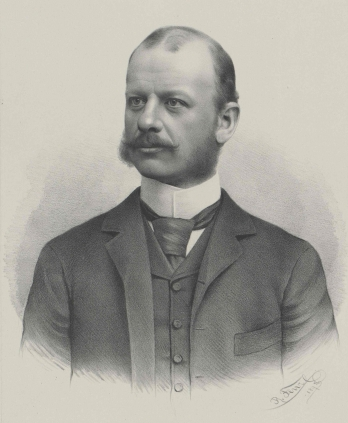 Alfred August Windischgrätz (1851–1927)